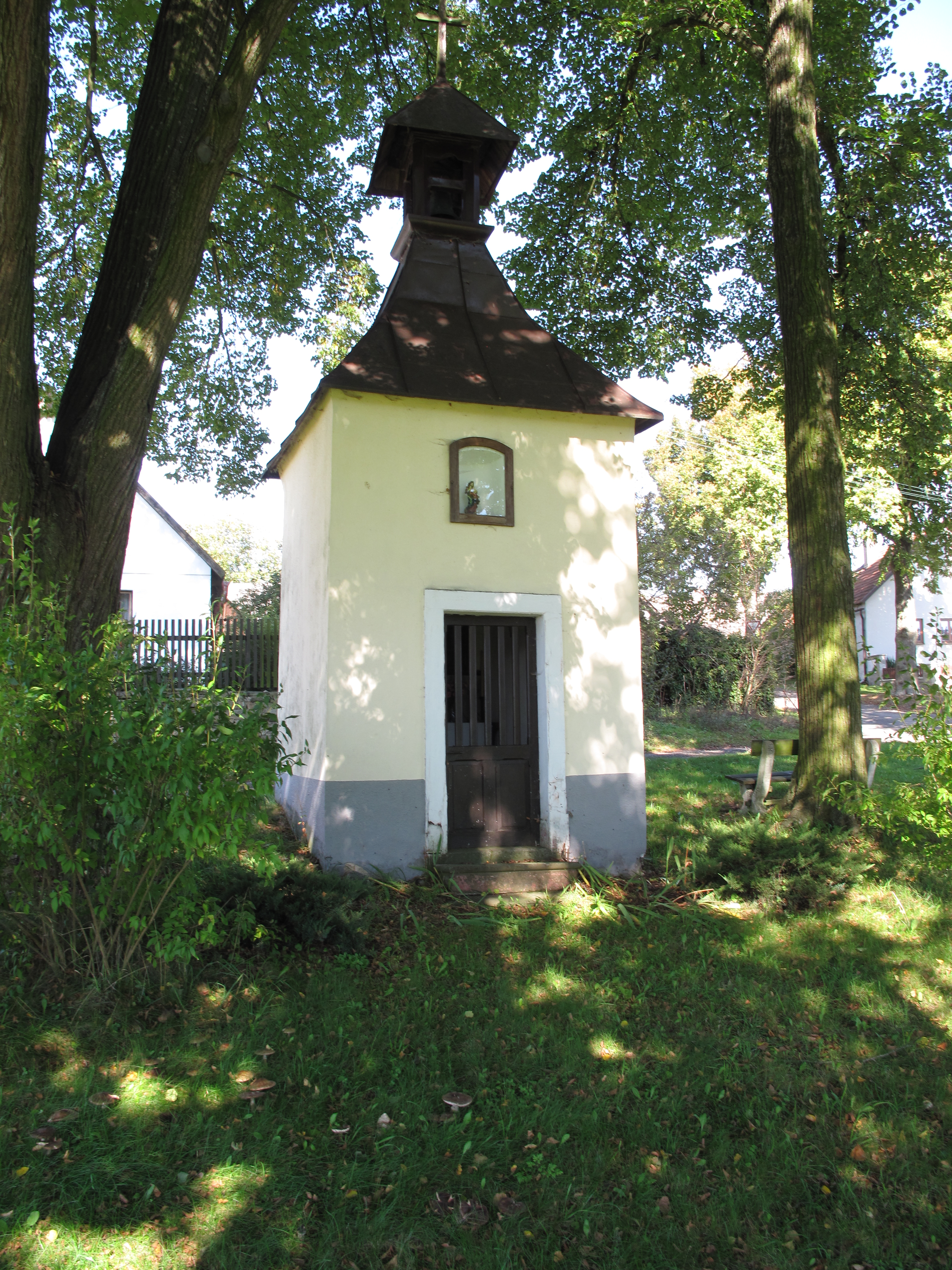 Kaplička v Makoluskách. Okres Kutná Hora, Česká republika.